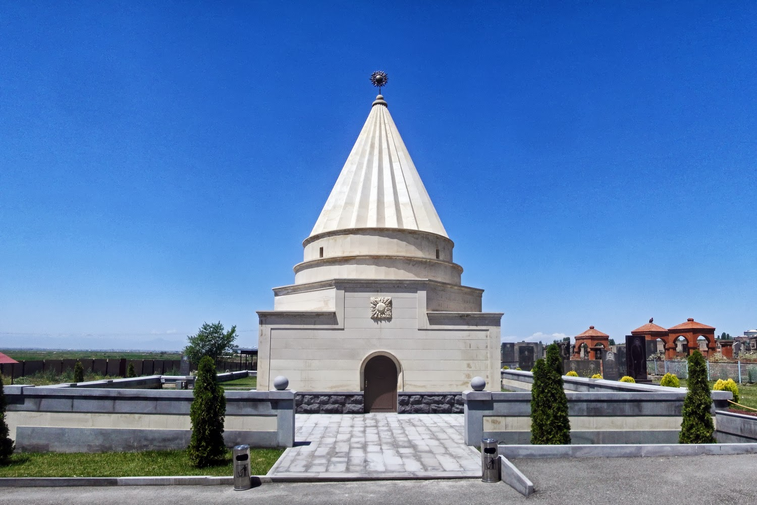 Ziarat Yazidi Temple, Aknalich, Armavir Province, Armenia.